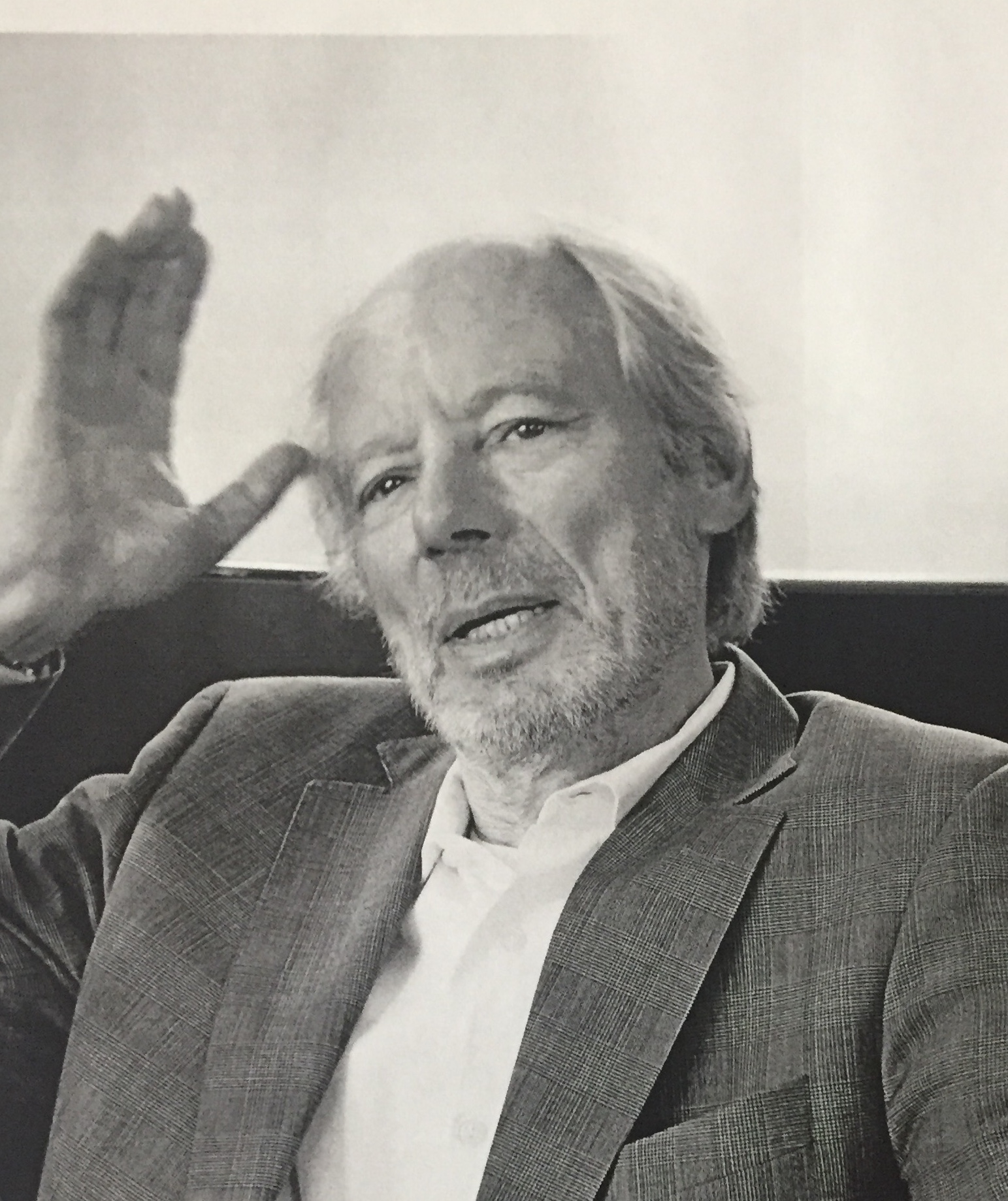 Michael Schwarz ist ein deutscher Kunsthistoriker, Ausstellungskurator, Hochschullehrer und ehemaliger Präsident der Hochschule für Bildende Künste Braunschweig. Er ist Autor von Büchern und Aufsätzen zur zeitgenössischen Kunst. Wikipedia Geboren: 14. Januar 1940 (78 Jahre), Greifswald